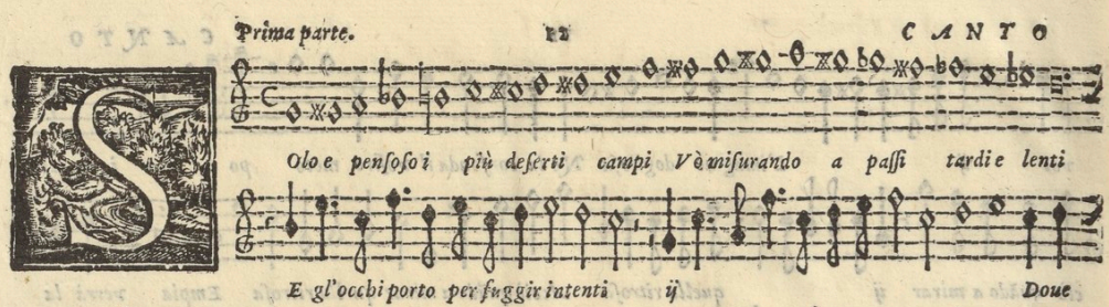 Luca Marenzio : ligne de Cantus du madrigal Solo e pensoso (1599)